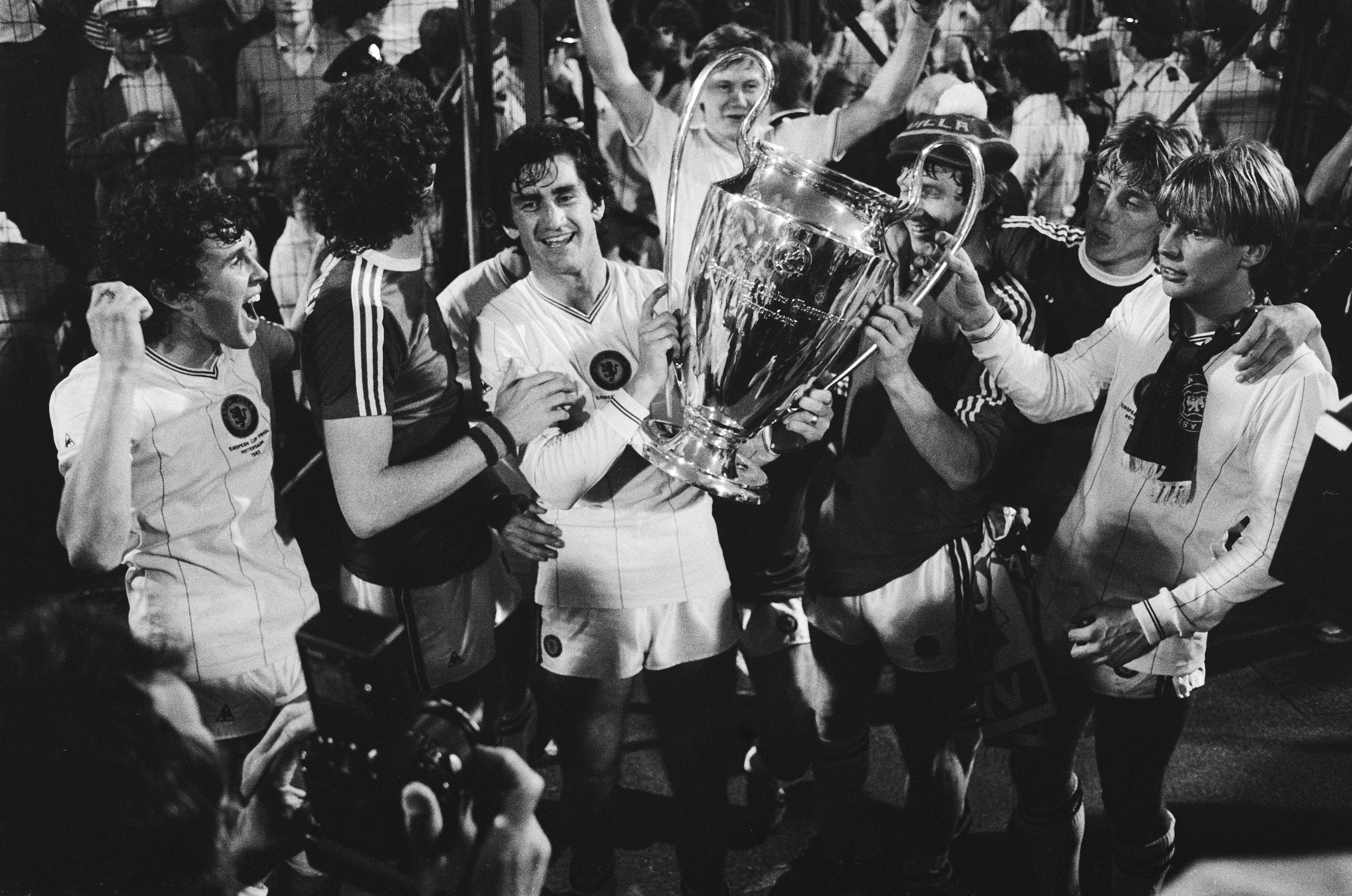 Collectie / Archief : Fotocollectie Anefo Reportage / Serie : [ onbekend ] Beschrijving : FC Bayern Munchen tegen Aston Villa 0-1 Europa Cup I blijde Aston Villa spelers met de Cup Datum : 26 mei 1982 Trefwoorden : sport, voetbal Persoonsnaam : Aston Villa, CUP, FC Bayern Munchen Fotograaf : Antonisse, Marcel / Anefo Auteursrechthebbende : Nationaal Archief Materiaalsoort : Negatief (zwart/wit) Nummer archiefinventaris : bekijk toegang 2.24.01.05 Bestanddeelnummer : 932-1812